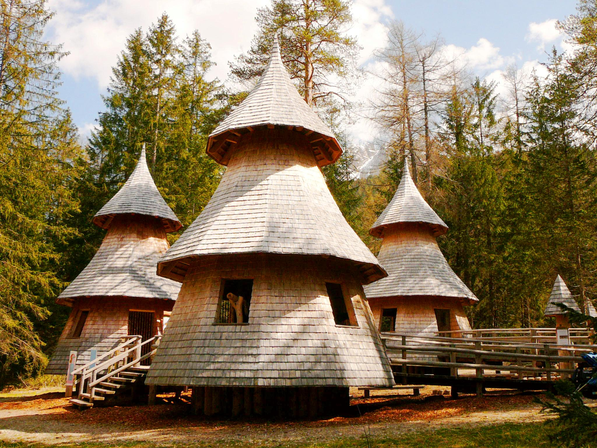 le tre casette nel bosco a Dobbiaco